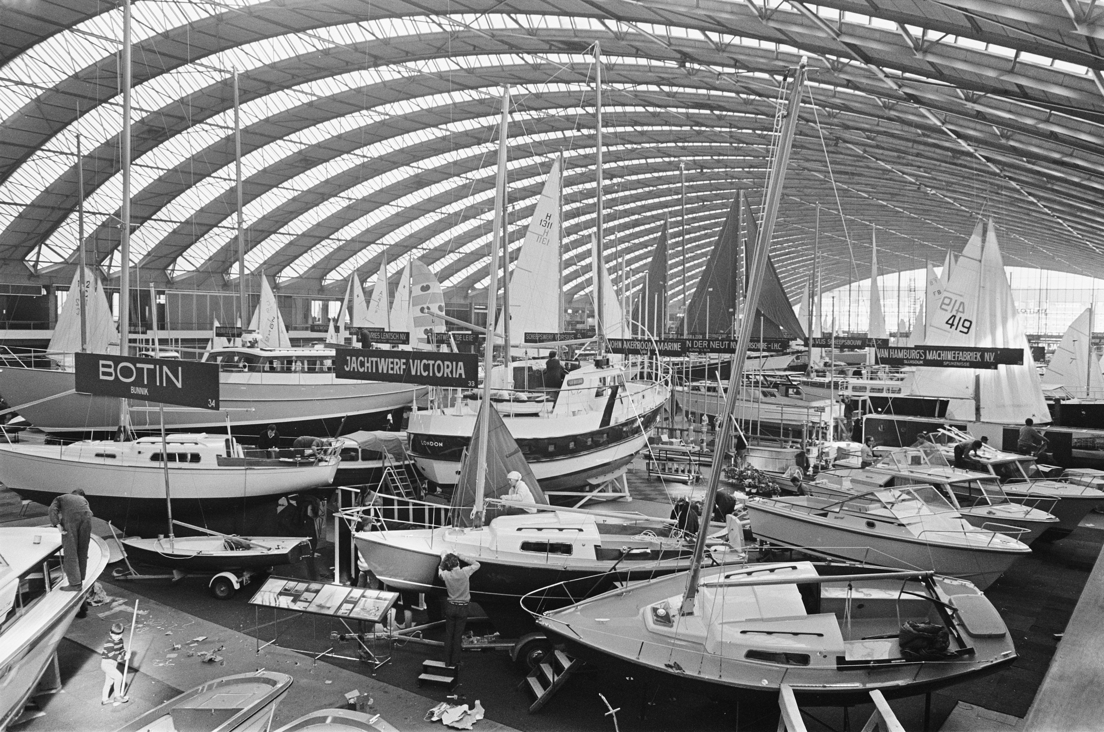 Collectie / Archief : Fotocollectie Anefo Reportage / Serie : [ onbekend ] Beschrijving : Hiswa 1968. Overzicht Europahal in RAI Datum : 14 maart 1968 Trefwoorden : beurzen Persoonsnaam : Europahal Instellingsnaam : HISWA Fotograaf : Nijs, Jac. de / Anefo Auteursrechthebbende : Nationaal Archief Materiaalsoort : Negatief (zwart/wit) Nummer archiefinventaris : bekijk toegang 2.24.01.05 Bestanddeelnummer : 921-1651